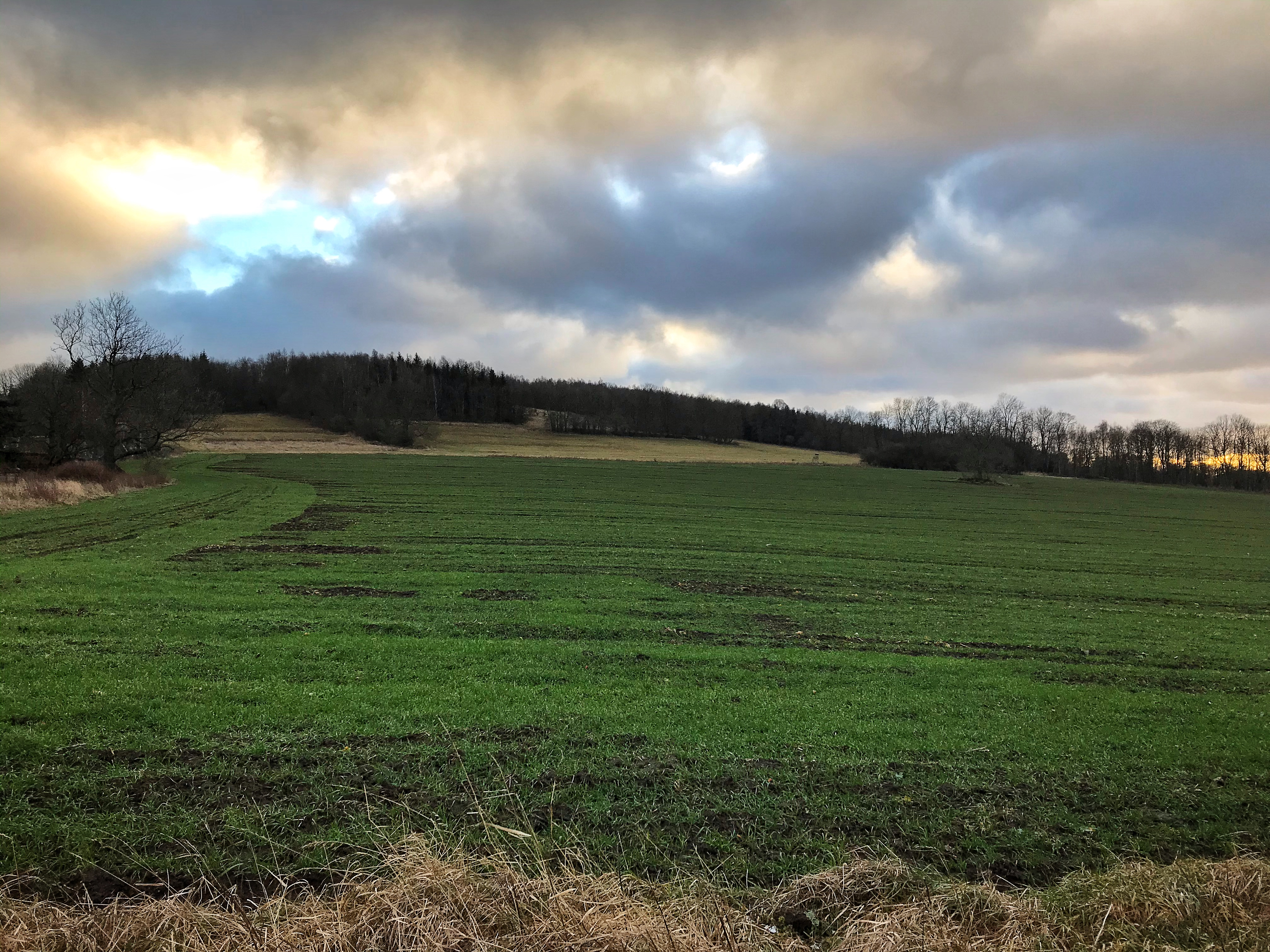 Hora Dobrná v Českém středohoří